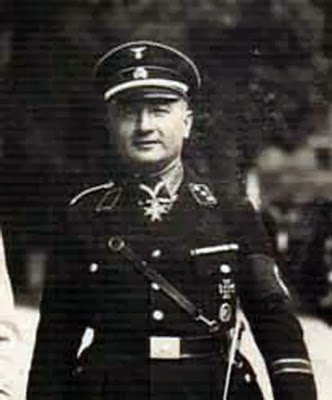 Gustav Adolf von Wulffen (* 18. April 1878 in Gotha; † 4. Mai 1945 in Borkheide) war ein deutscher Offizier, zuletzt Generalmajor sowie SS-Brigadeführer. hier im Rang SS-Untersturmführer.